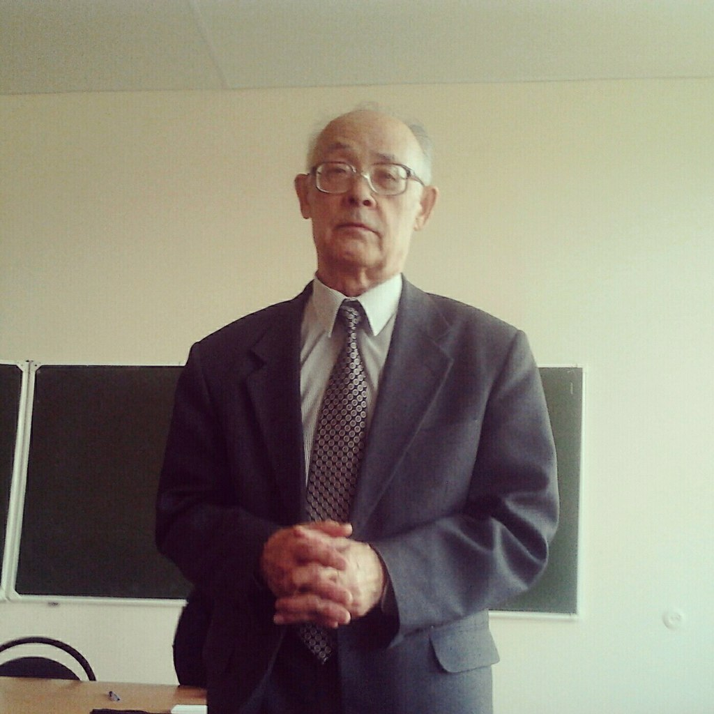 Фёдор Васильевич Цанн-кай-си